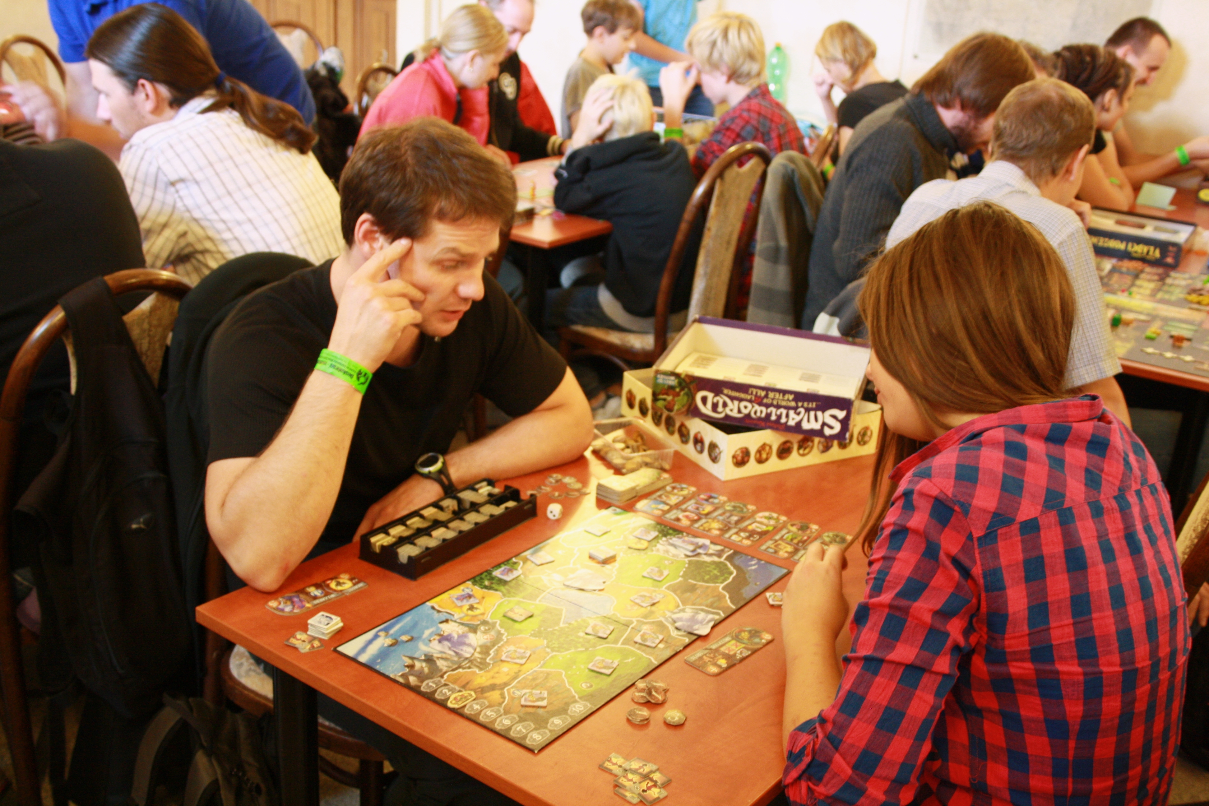 Deskohraní 2012 - Small World